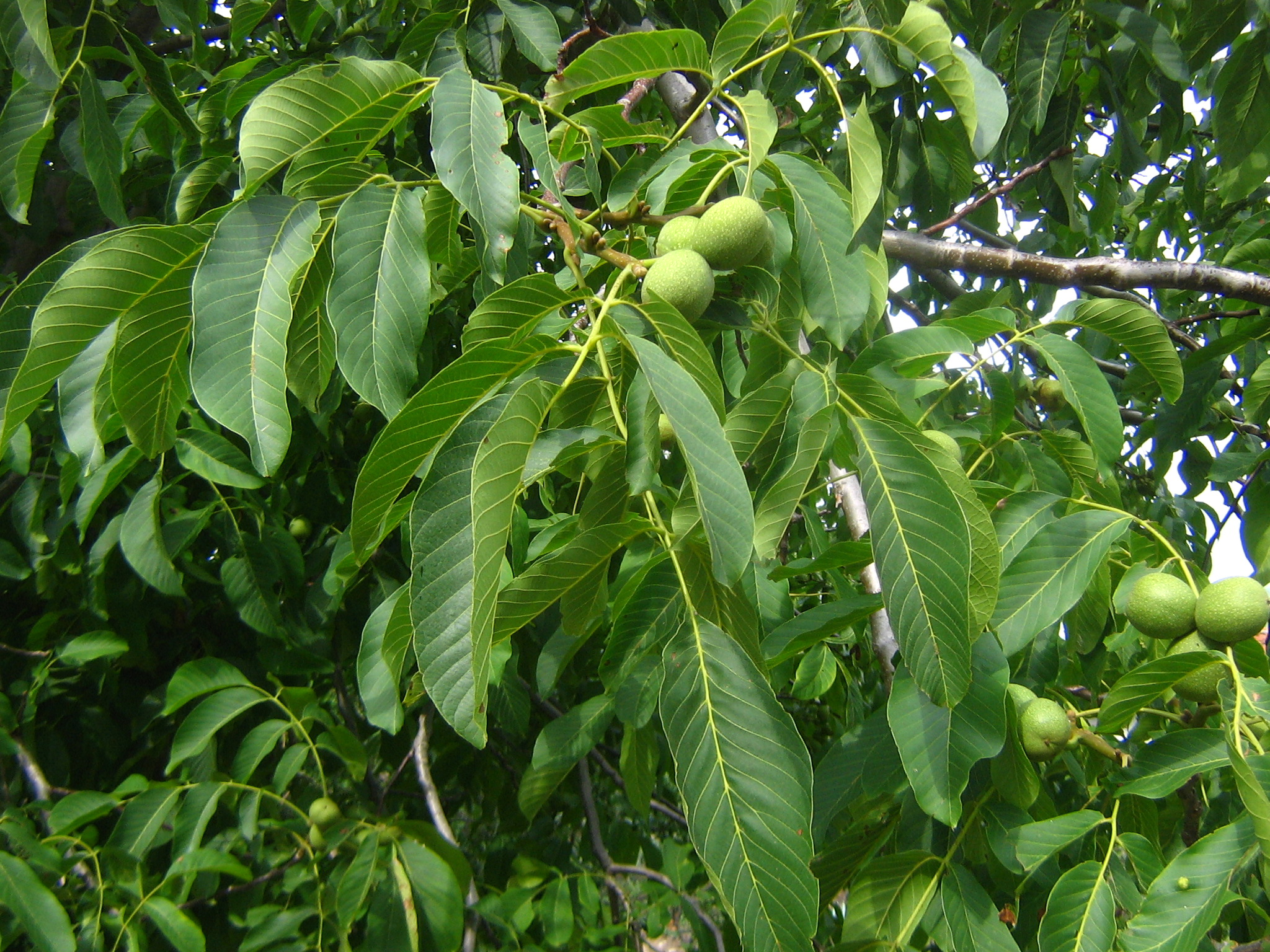 Η καρυδιά ( Καρυά, Juglans) ανήκει στην οικογένεια των Καρυοειδών. Tο πιο συνηθισμένο και γνωστό είδος είναι η Καρυά η βασιλική,λατινική ονομασία Juglans regia. Τα φύλλα της καρυδιάς είναι μεγάλα, μακριά, σύνθετα. Το κάθε φύλλο αποτελείται από 7-9 μικρά φύλλα, με ωοειδές σχήμα. Τα άνθη της είναι αφανή χωρίς πέταλα και τα αρσενικά σχηματίζουν ταξιανθίες. Ο κορμός της είναι παχύς και η διάμετρος του φτάνει τα 2,5 μέτρα. Η κοινή καρυδιά φτάνει σε ύψος τα 35 μέτρα και είναι γνωστή και με τις ονομασίες αγγλική ή περσική.